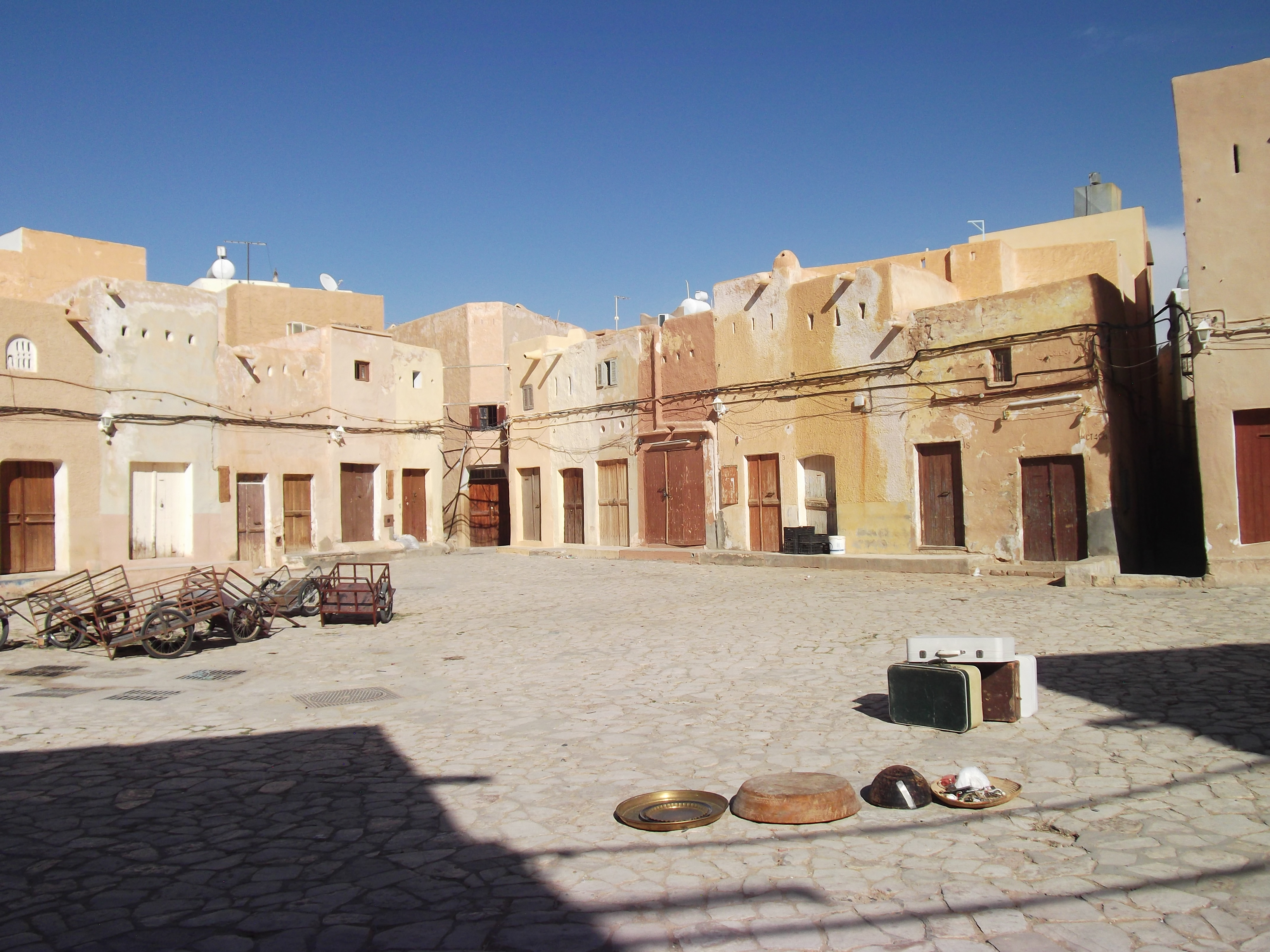 Place du marché "Lala Achou" de Beni Isguen. Petite ville antique fondée en 1347, Beni Isguen (At yezguen en Berbère) est aujourd'hui un des plus importants Ksour de la vallée des M'zab. Avec ses remparts intacts, la belle ordonnance de ses rues et de ses maisons et sa position de foyer Ibadite, Beni Isguen est toujours jalousement préservée par les Mouzabites.